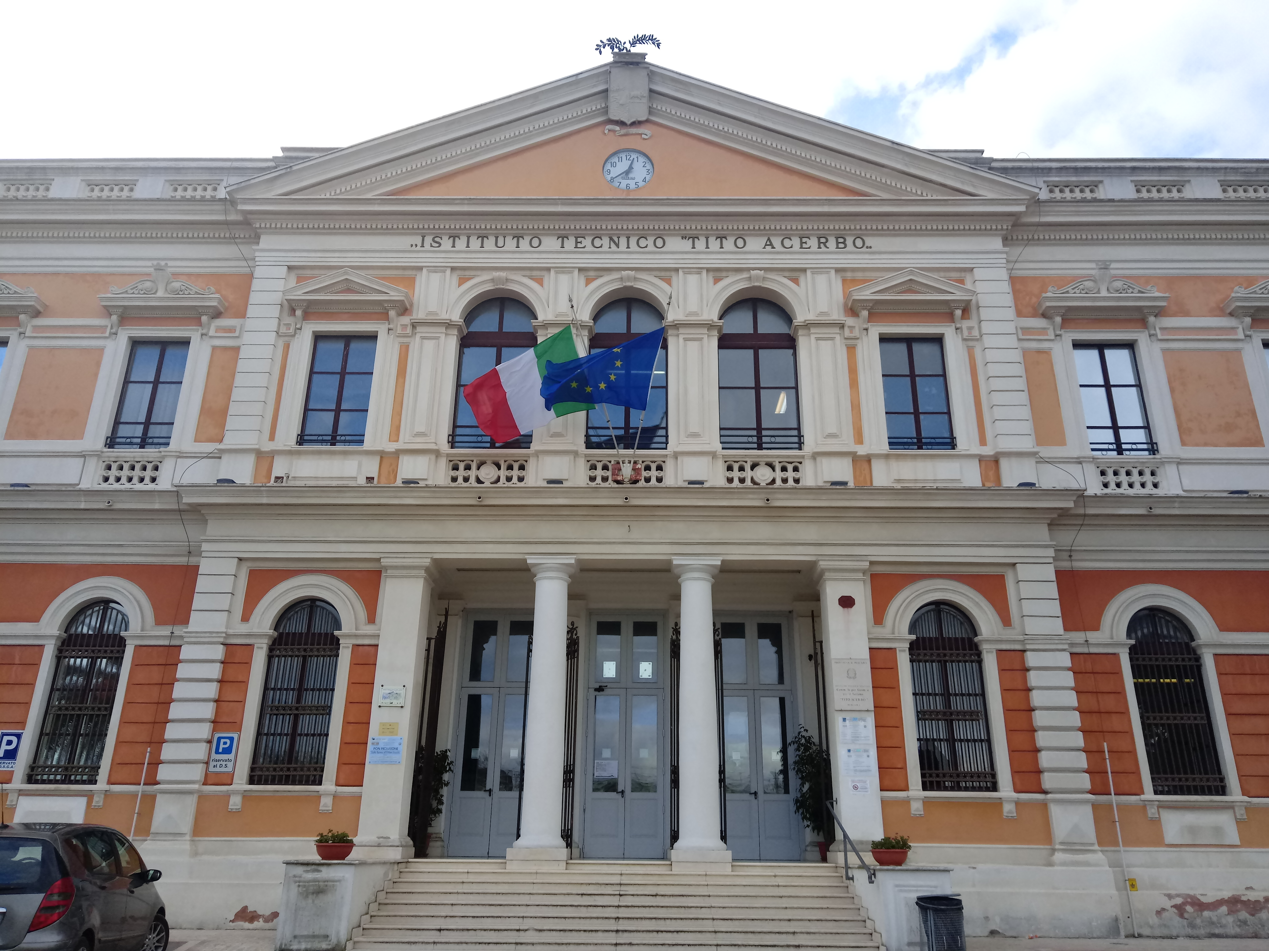 Foto della facciata principale dell'Istituto tecnico Tito Acerbo di Pescara